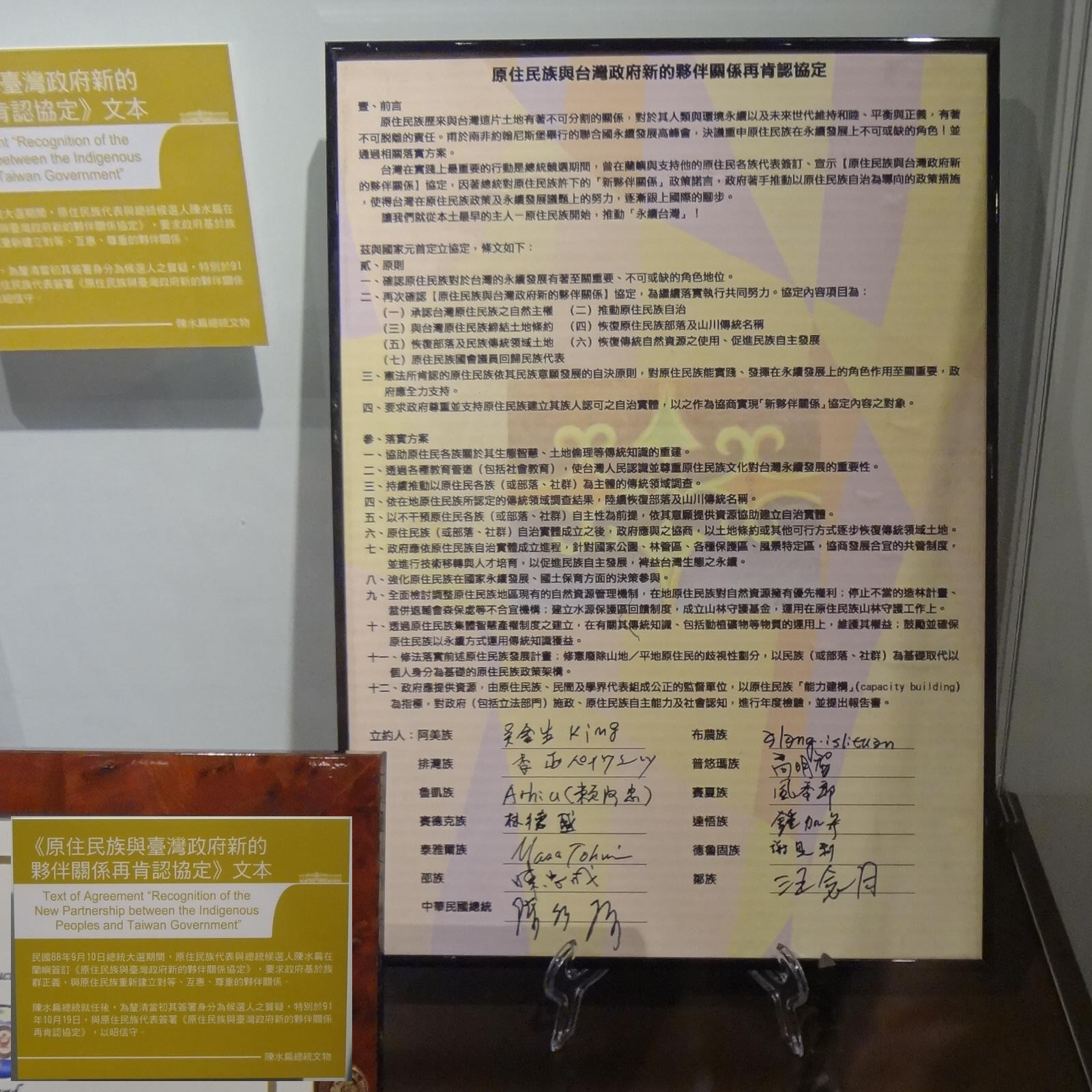 中文（台灣）: 中華民國國史館展示的陳水扁總統文物：《原住民族與台灣政府新的夥伴關係再肯認協定》文本。